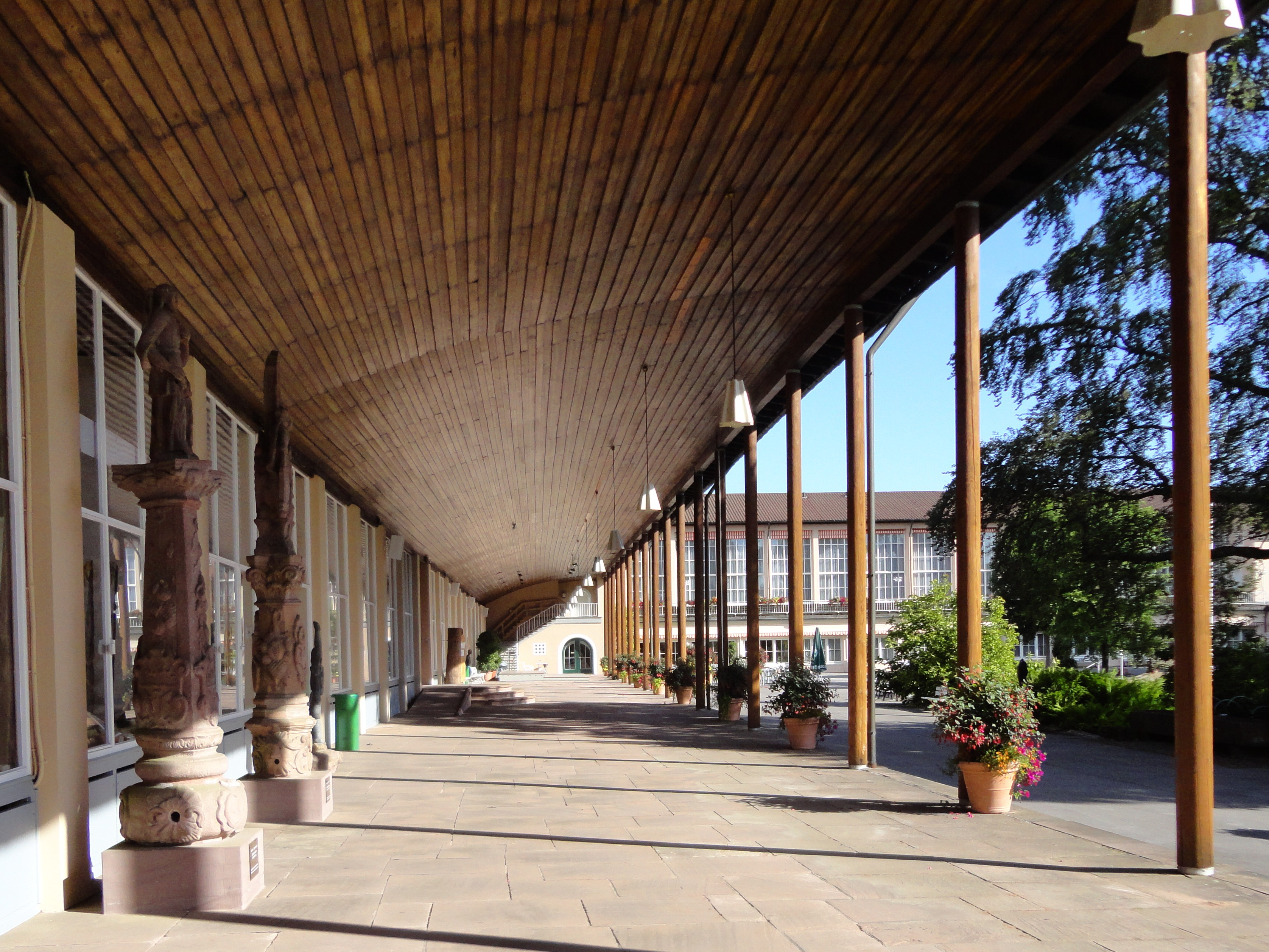 Wandelhalle auf der Westseite des Kurhauses in Freudenstadt, vom Kurgarten aus gesehen. Links vorne stehen zwei Originale zu Brunnenfiguren in Freudenstadt